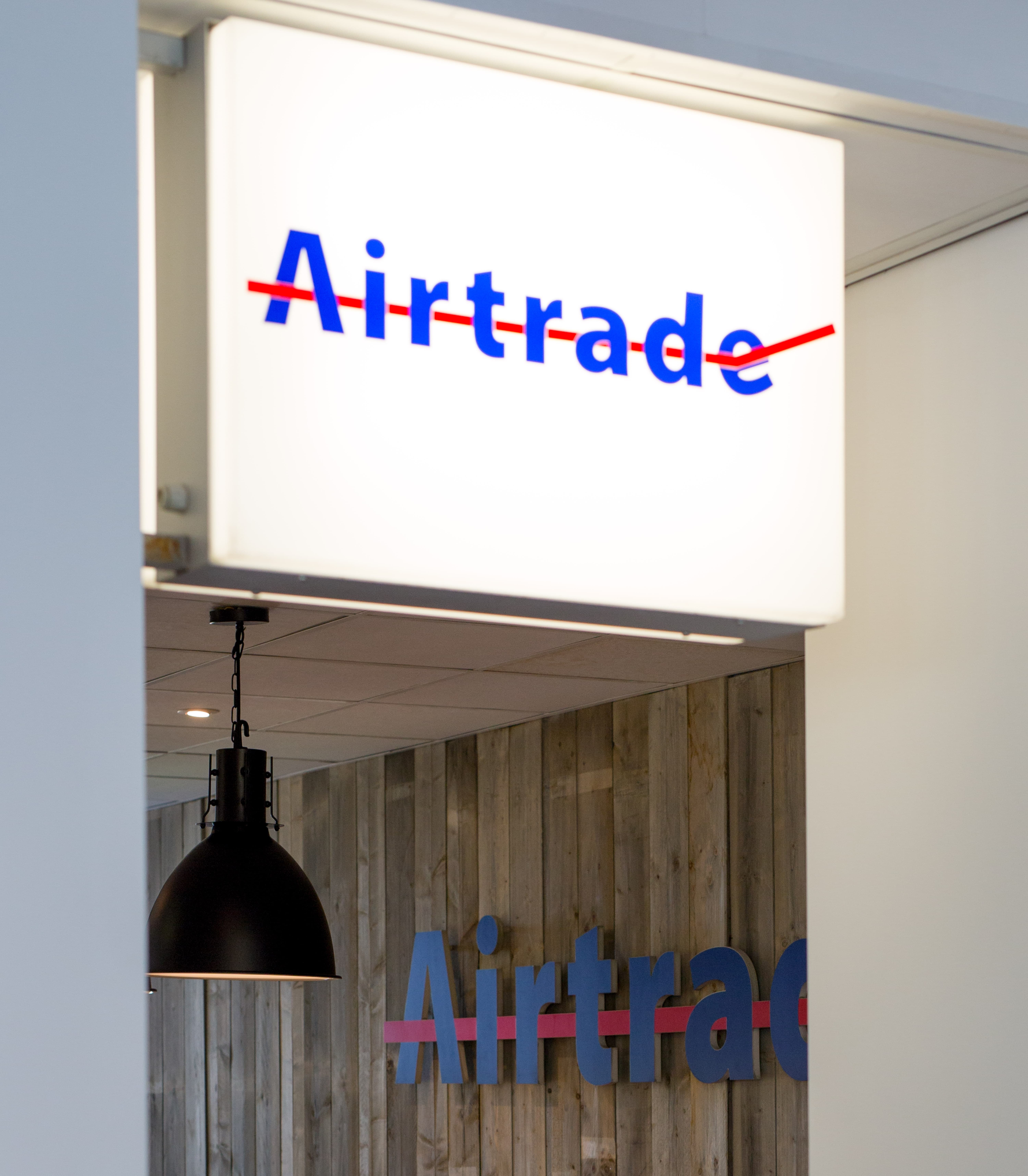 Airtrade logo kantoor